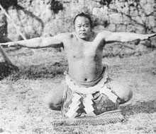 16th yokozuna, Nishinoumi Kajirō I (1855–1908)